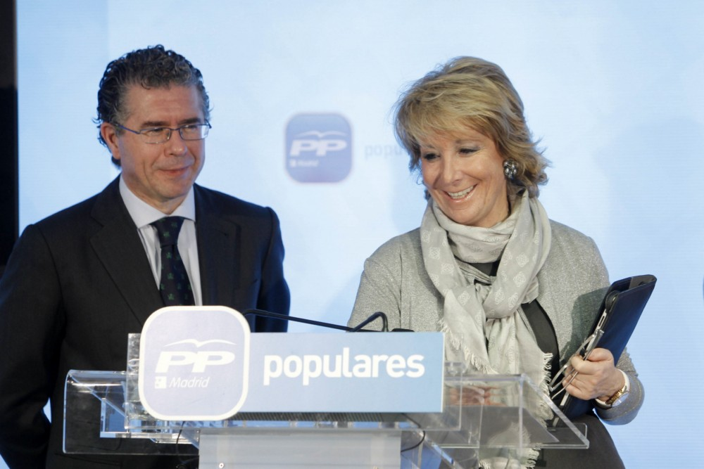 Presentación de "Gente con Esperanza"